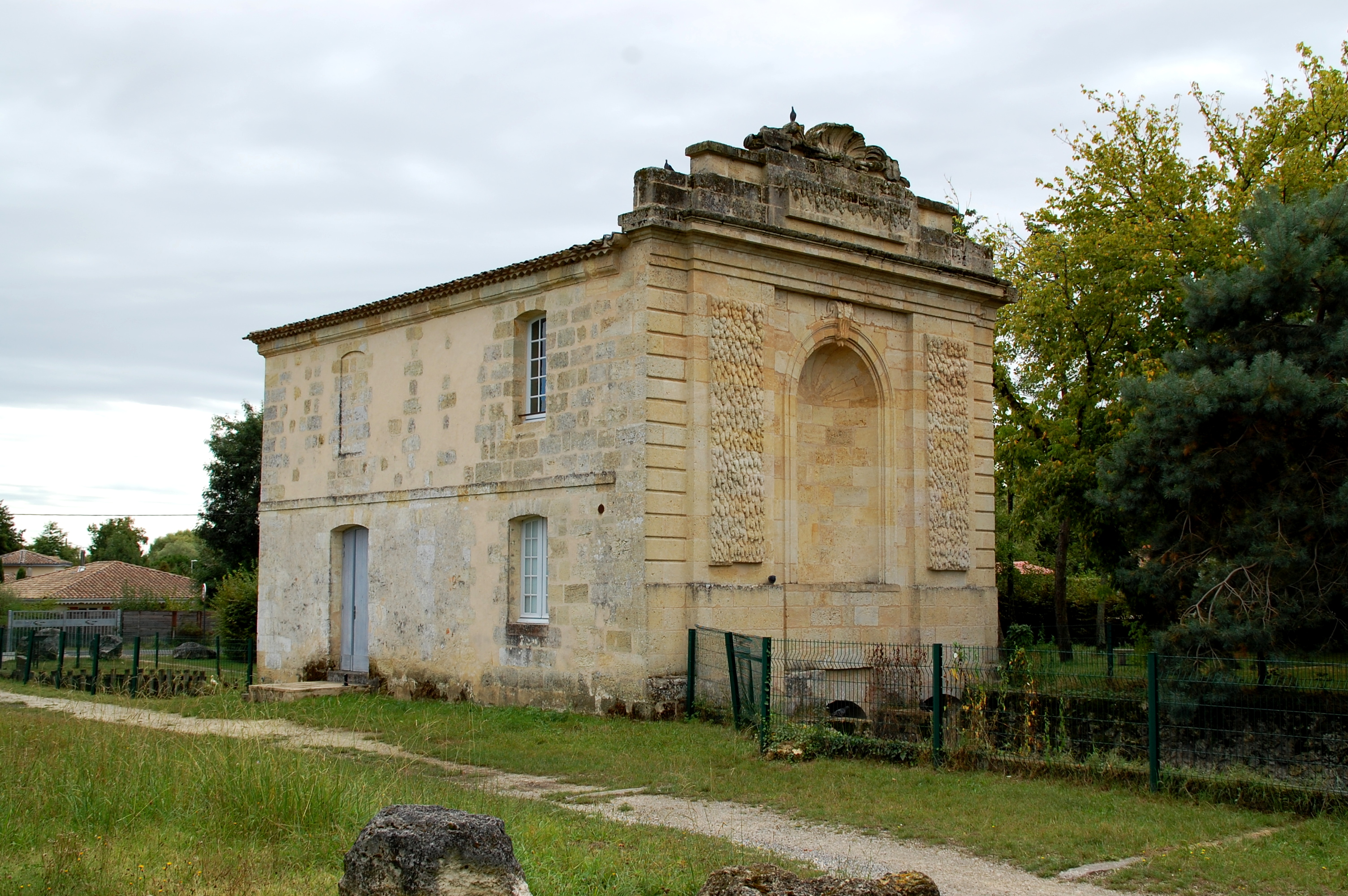 Moulin de Noès, (Inscrit), Pessac, Gironde, France.